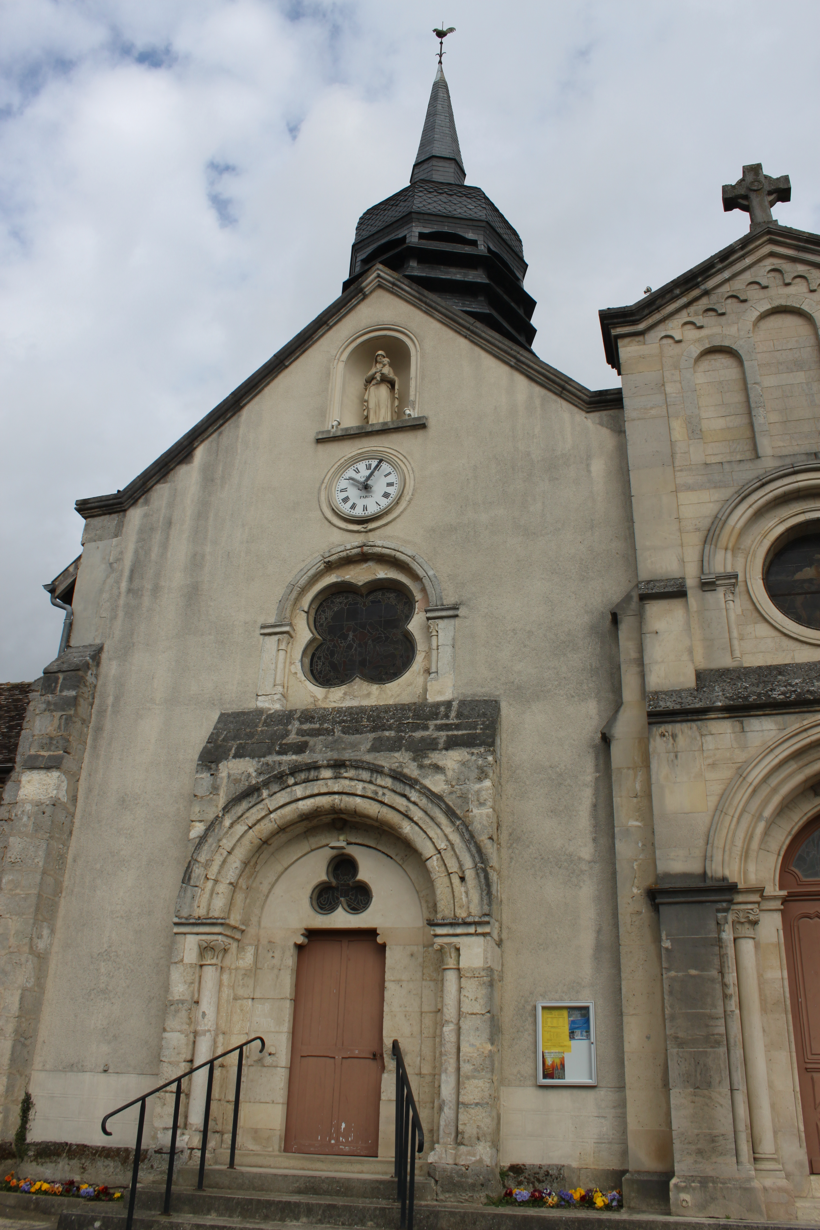 Partie encienne de l'Eglise de Pierry